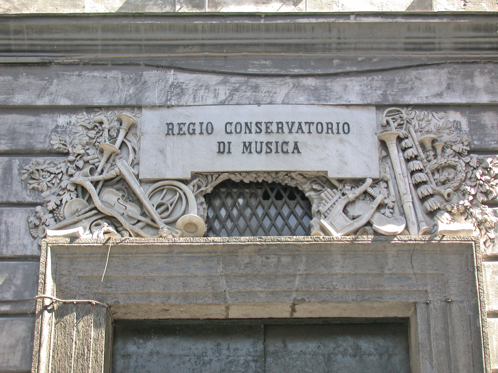 Italia, regione Campania, Napoli, conservatorio di San Pietro a Maiella, targa all'ingresso